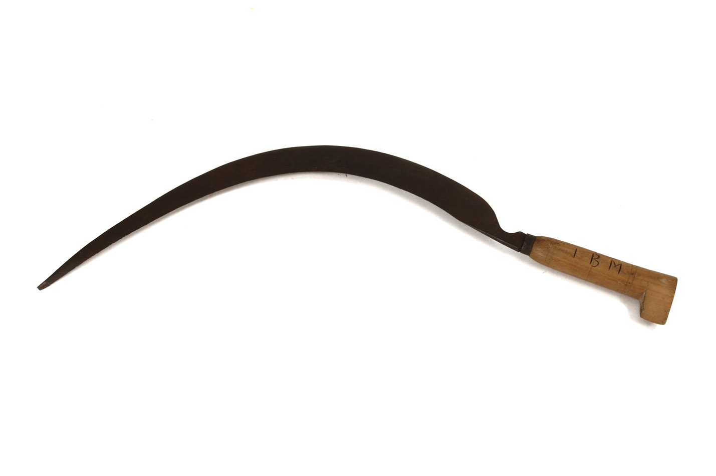 Fotografies dels objectes de l'exposició permanent de la sala "Secà i Muntanya" del Museu Valencià d'Etnologia - Fotografies de Mateo Gamon.